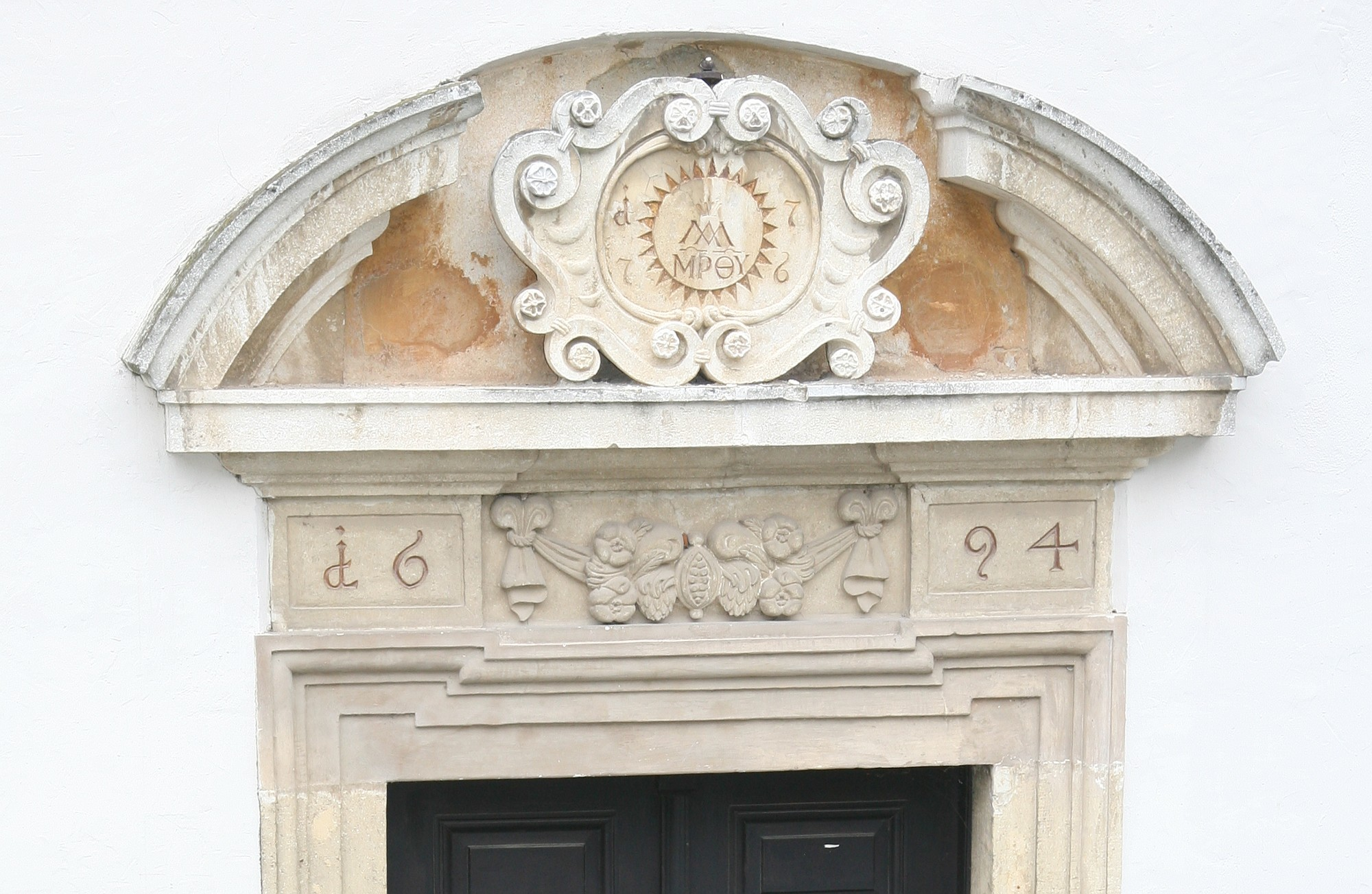 Das Nordportal des Piaristengymnasiums Krems mit dem Piaristenzeichen